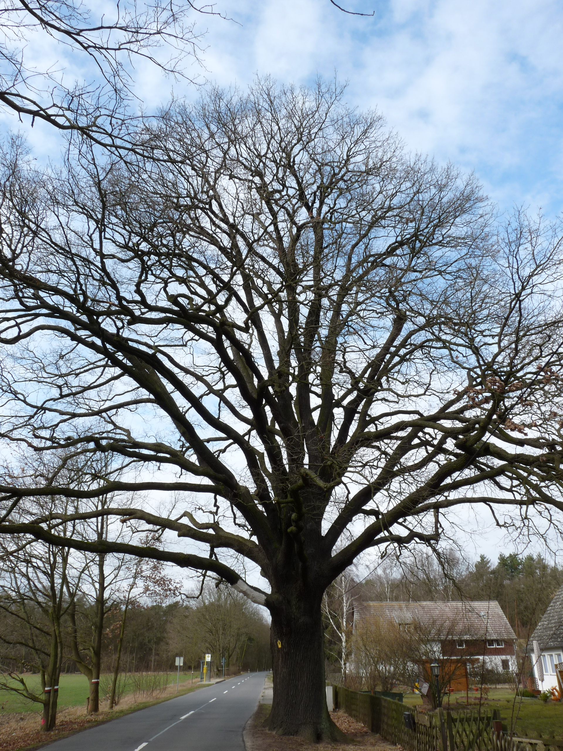 Stiel-Eiche (Quercus robur), Kronendurchmesser 30 m, Kemnitzer Chaussee Richtung Autobahnbrücke